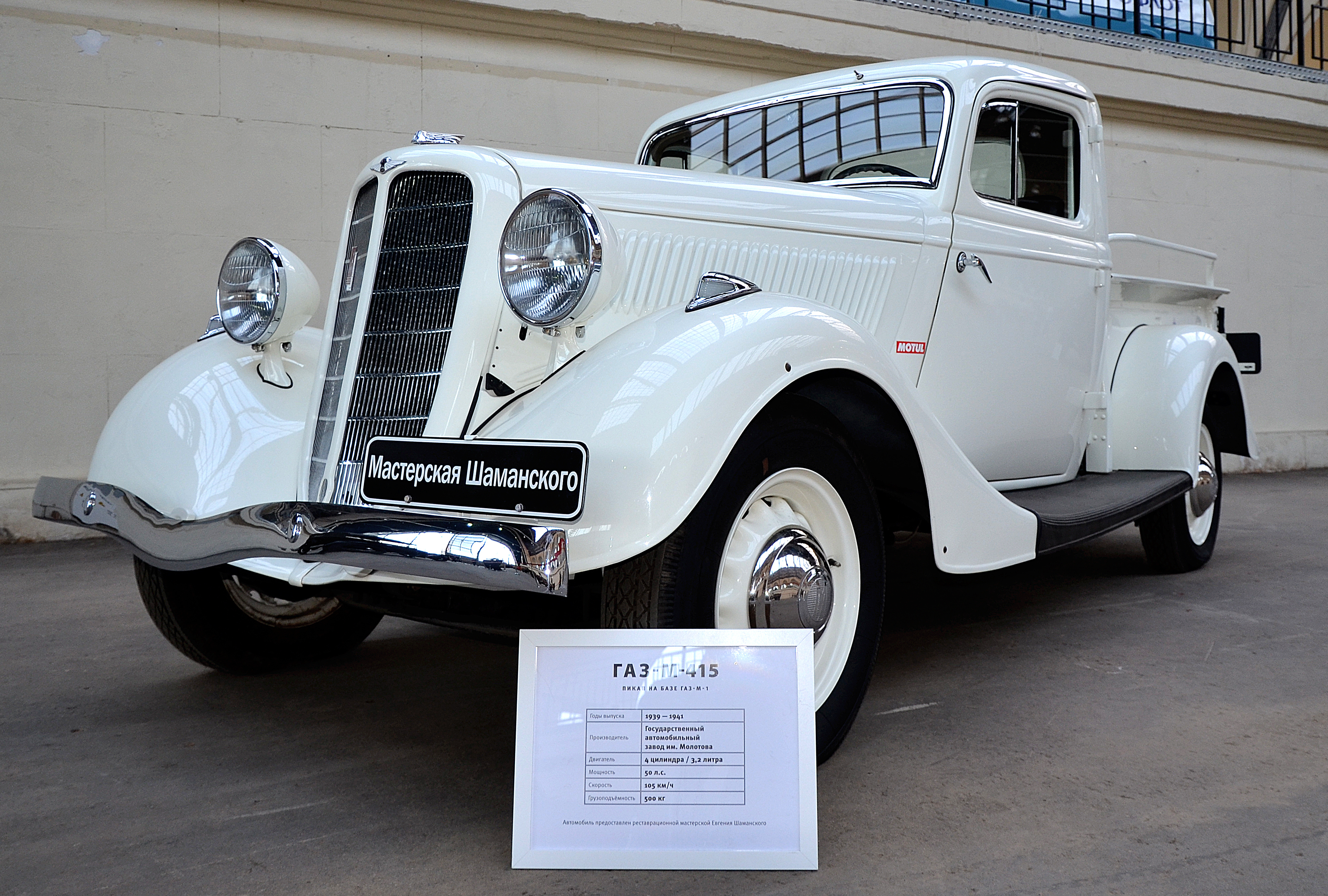 Можно увидеть здесь : You can see here